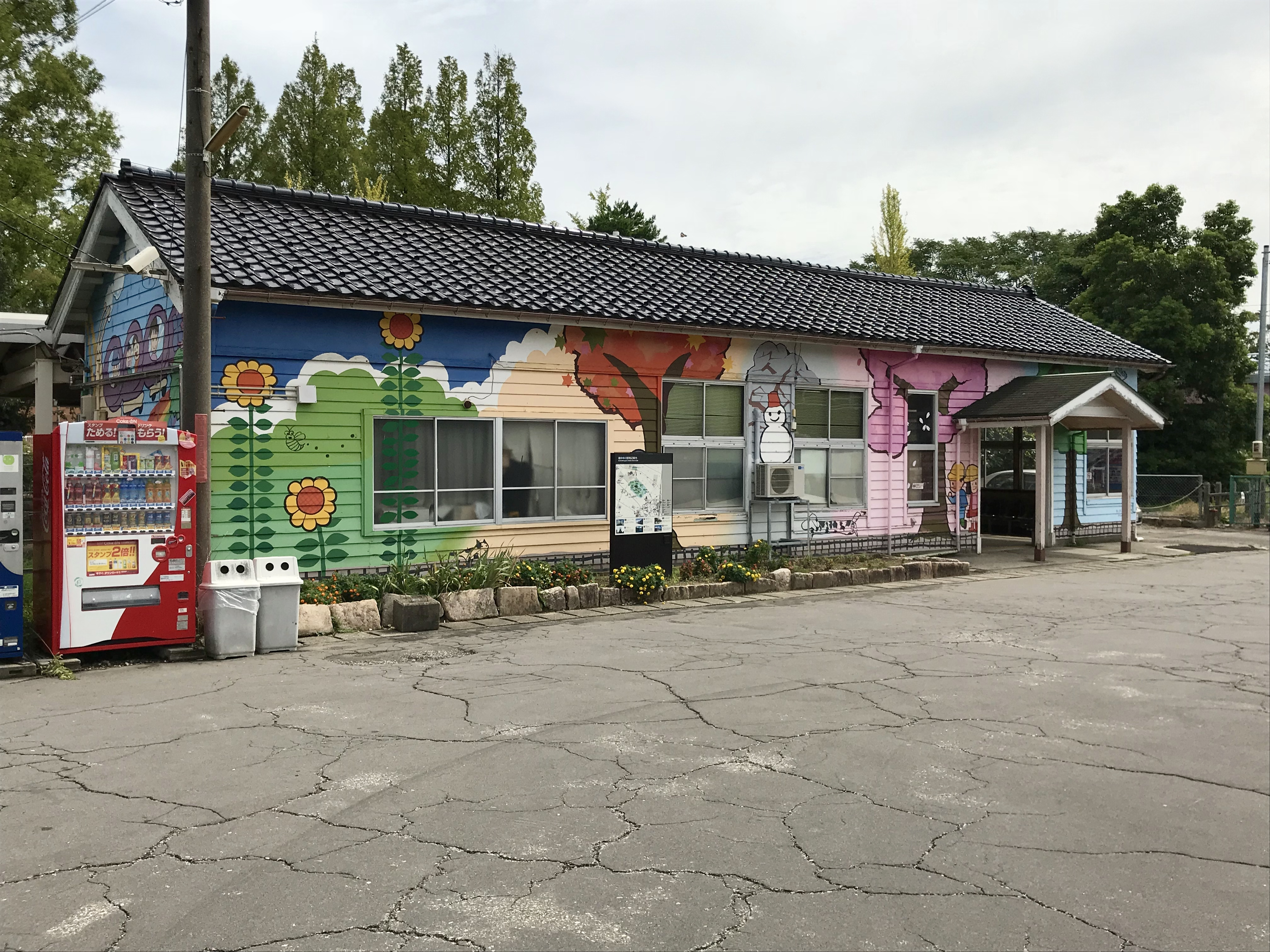 JR西日本氷見線越中中川駅駅舎